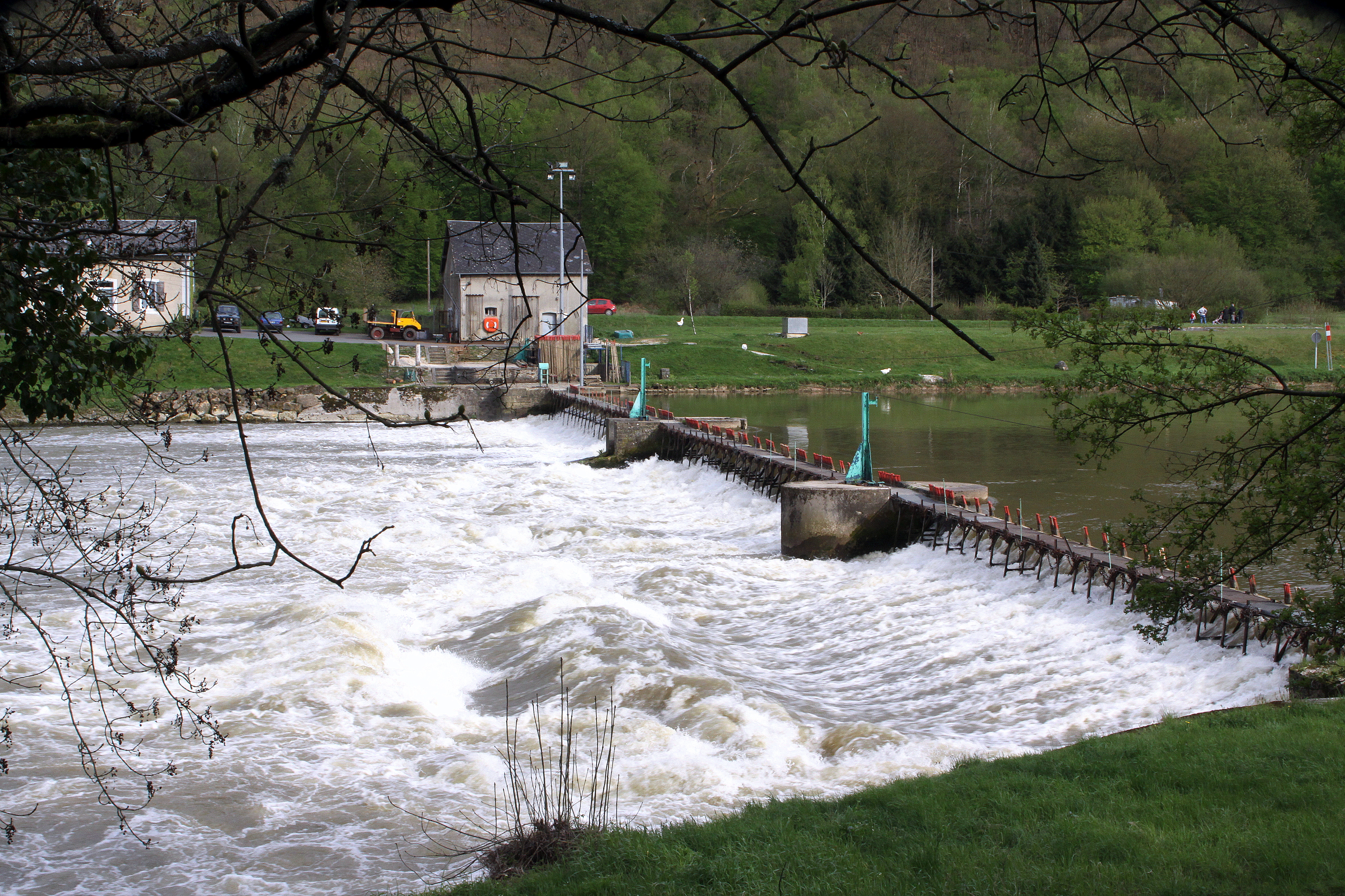 D'Nolewier vu Fépin